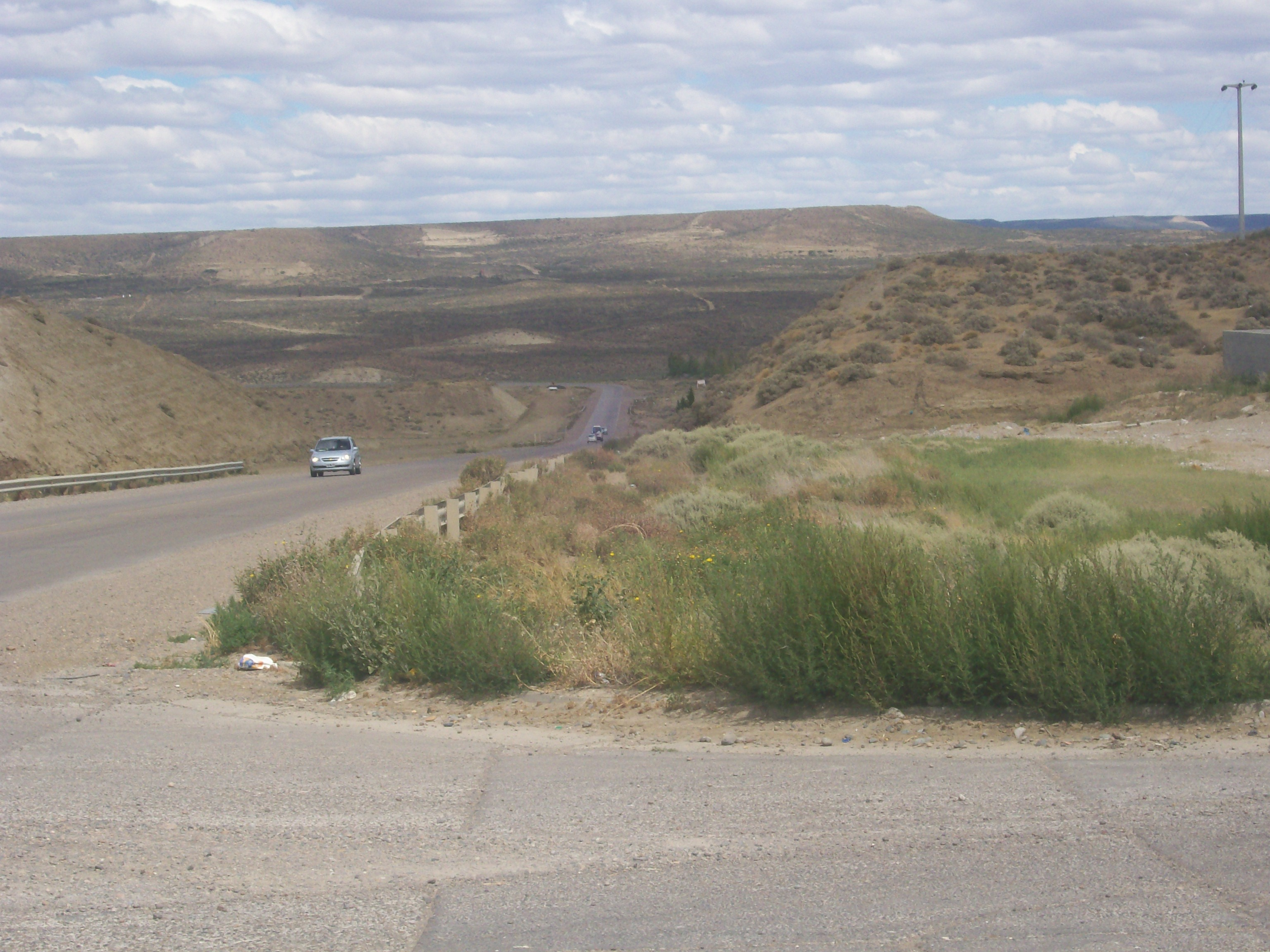 Vista a la salida de caleta